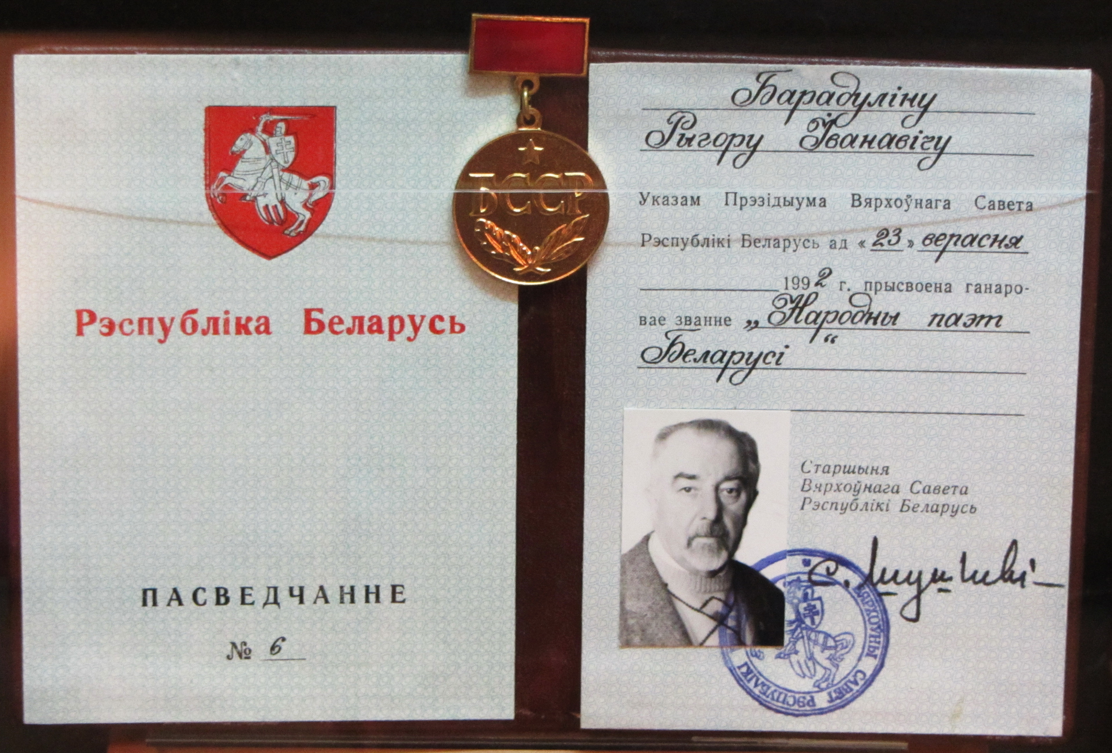 Беларуская (тарашкевіца): Выстаўка да 80-годзьдзя зь дня нараджэньня Рыгора Барадуліна ў музэі Максіма Багдановіча ў Менску, арганізаваная Дзяржаўным музэем гісторыі беларускай літаратуры. Пасьведчаньне аб званьні Народнага паэта Беларусі.